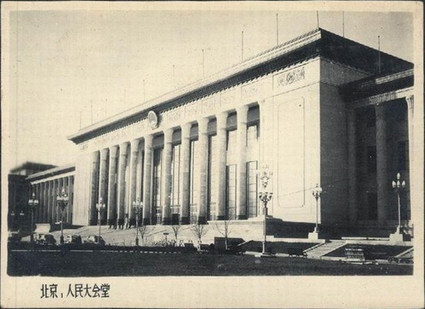 1959年的人民大会堂。